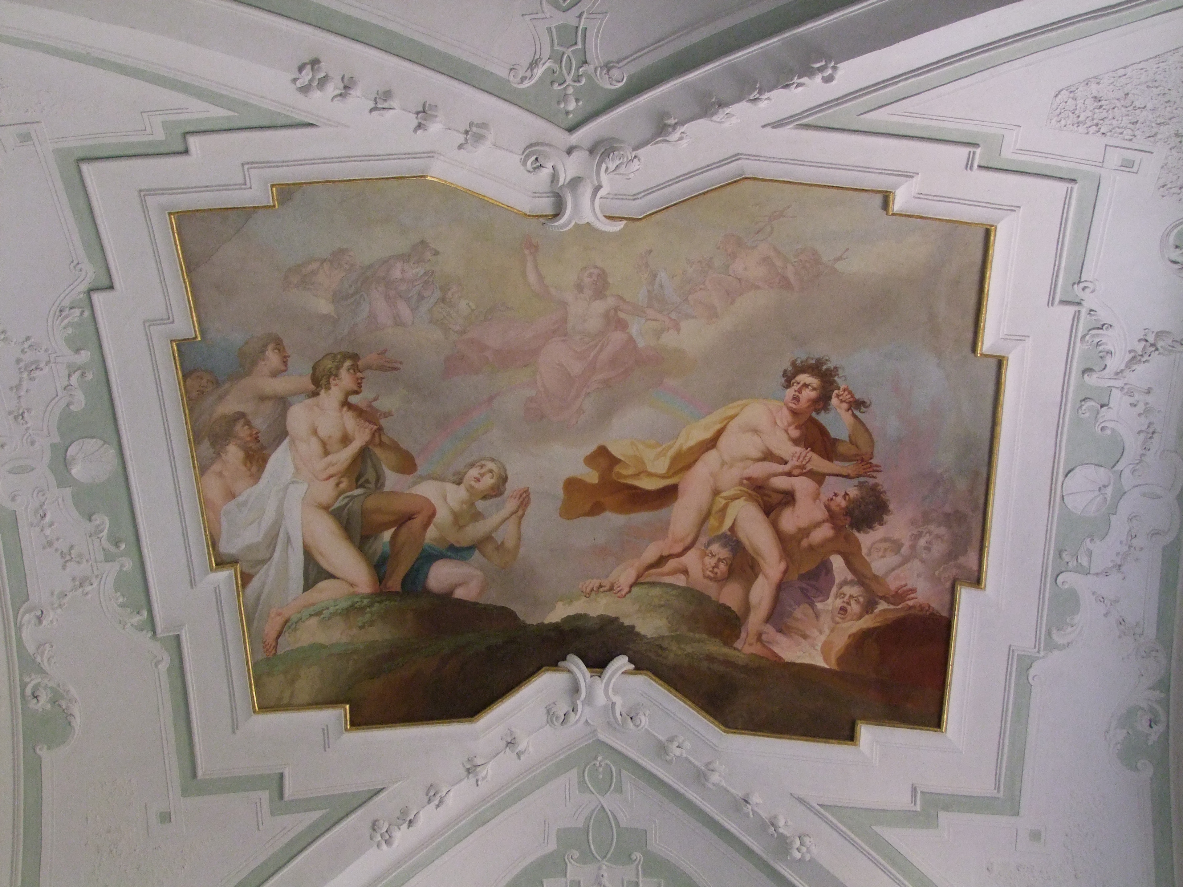 St. Georg, ehemalige Klosterkirche des oberschwäbischen Klosters Ochsenhausen